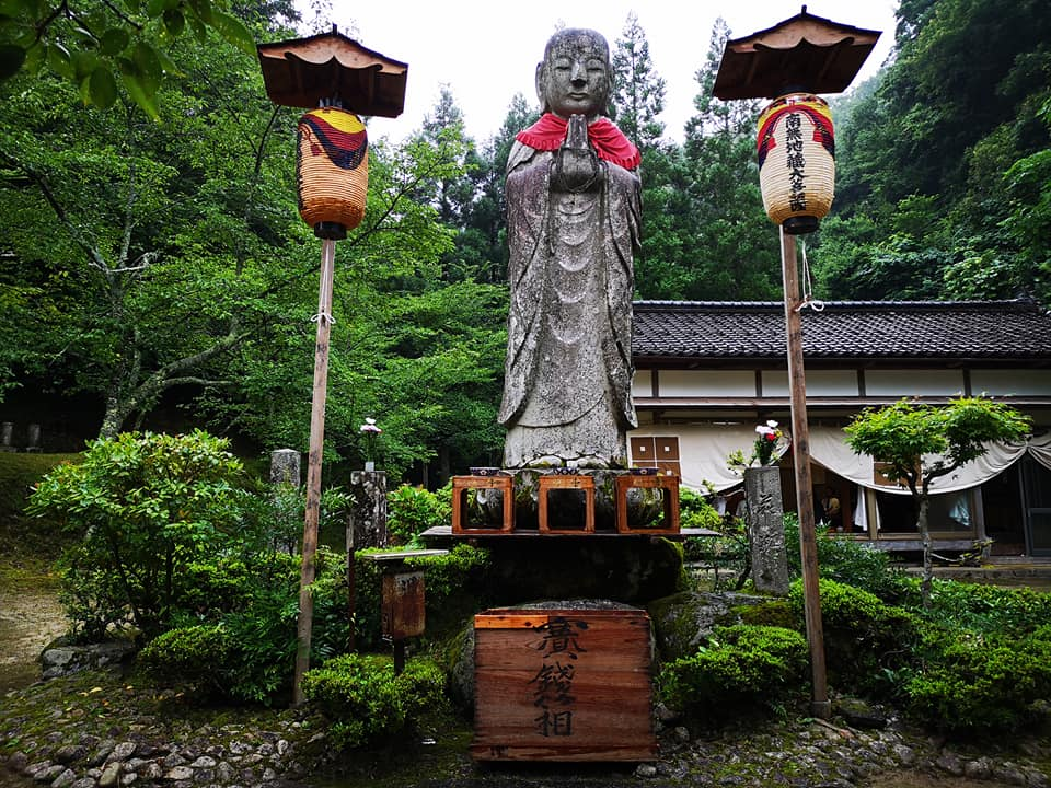 京丹後市平地峠に所在する地蔵尊。７月の平地地蔵公園祭の様子。